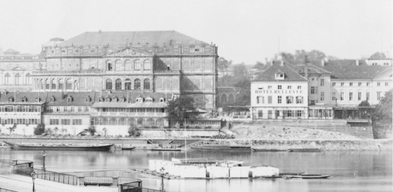 Dresden, Blick vom Neustädter Ufer über die Elbe auf das este Hoftheater (links) und das Hotel Bellevue (rechts)